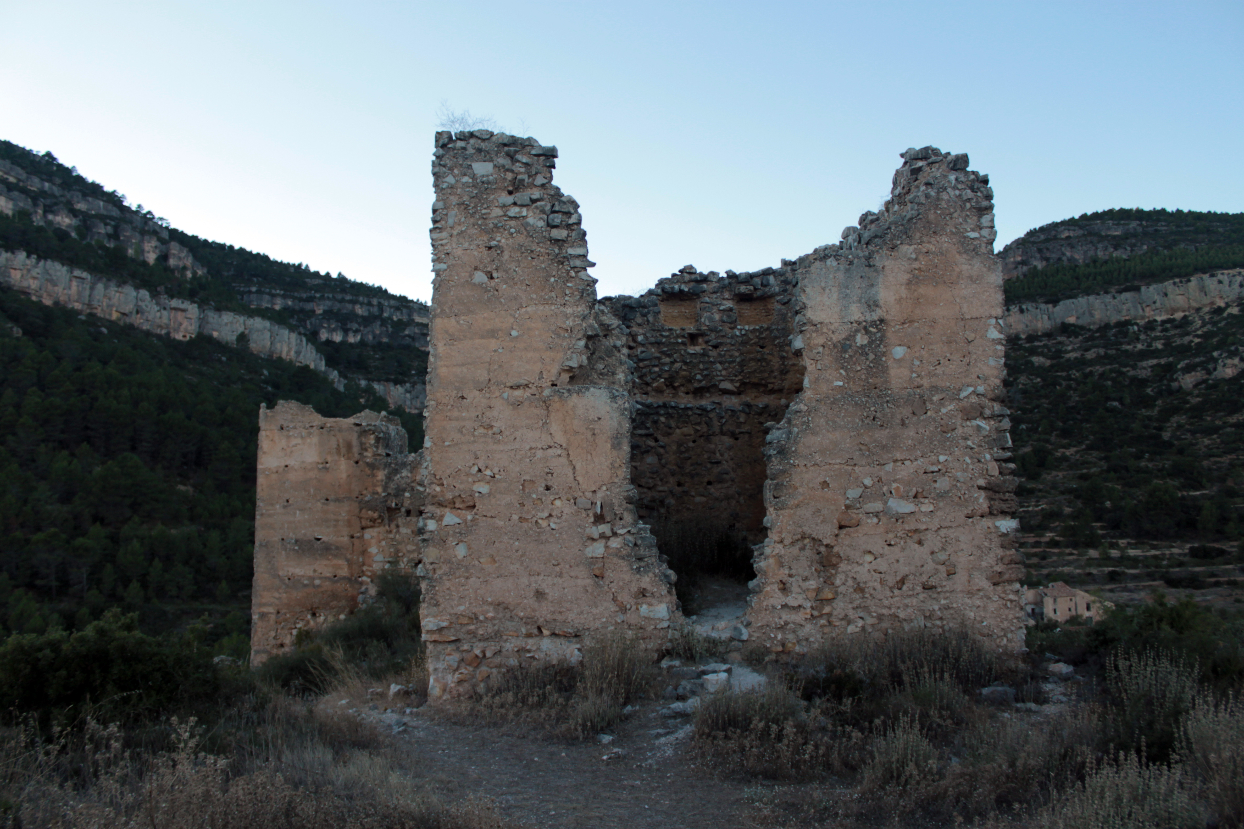 Castillo de Chera localizado en un cerro próximo a la población que le da nombre en la comarca de Requena-Utiel, provincia de Valencia, Comunidad Valenciana, España. Torre del homenaje de la fortificación observada desde el interior. Se observa el hueco dejado tras el hundimiento de la muralla situada sobre la puerta. Al fondo la torre occidental.